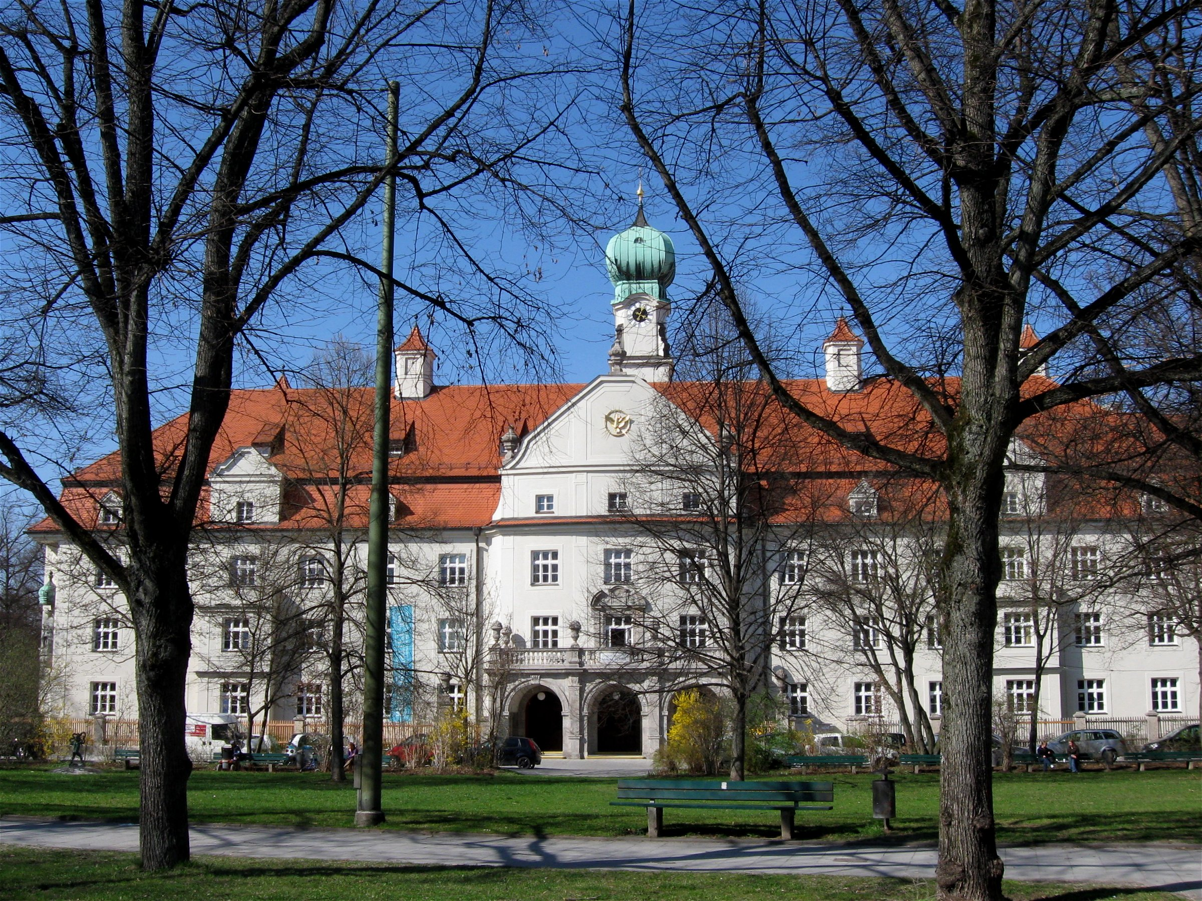 Dom-Pedro-Platz 6; Heiliggeistspital (städtisches Altersheim), weitläufiger, klosterartiger Neubarock-Komplex mit geschlossenem Innenhof und nach Osten offenem Außenhof, 1904-07, von Hans Grässel. In der Mitte des Westflügels reich ausgestattete Kath. Kirche mit Turm; mit Ausstattung; vor dem Kircheneingang und dem Hauptportal im Süden steinerne Balkonvorbauten. Im Süden, Westen und Norden Vorgartenzäune mit Vasenpfeilern an den Ecken und zu Seiten der Mitteleingänge. Im Osten Garten mit mehreren Steinfiguren, Brunnen und Balustraden. An seiner Nordseite (entlang der Hanebergstraße) das gutshofartige Wirtschaftsgebäude. In der Mauer an der Hanebergstraße und Paschstraße barockisierende Tore. Erweiterungsbau im Südosten (Braganzastraße 8) modern.